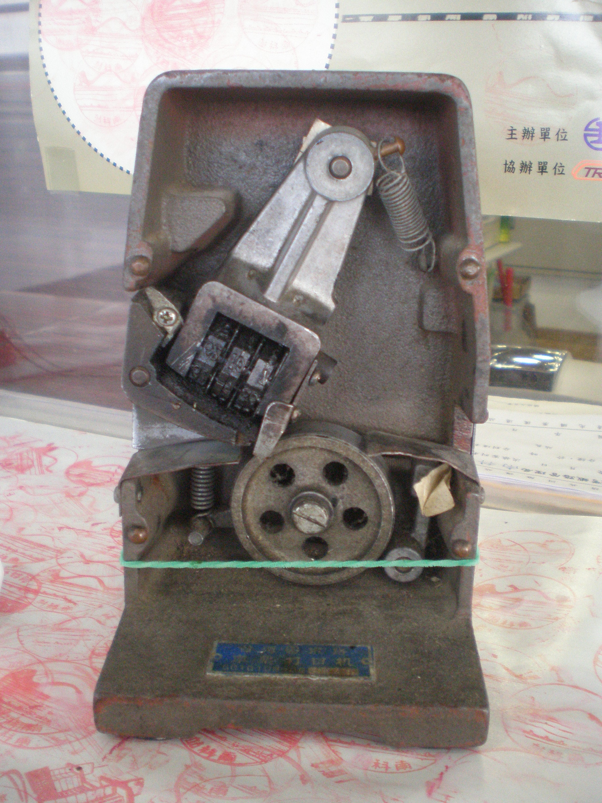 台鐵出售名片式車票時在車票上印日期的軋日機